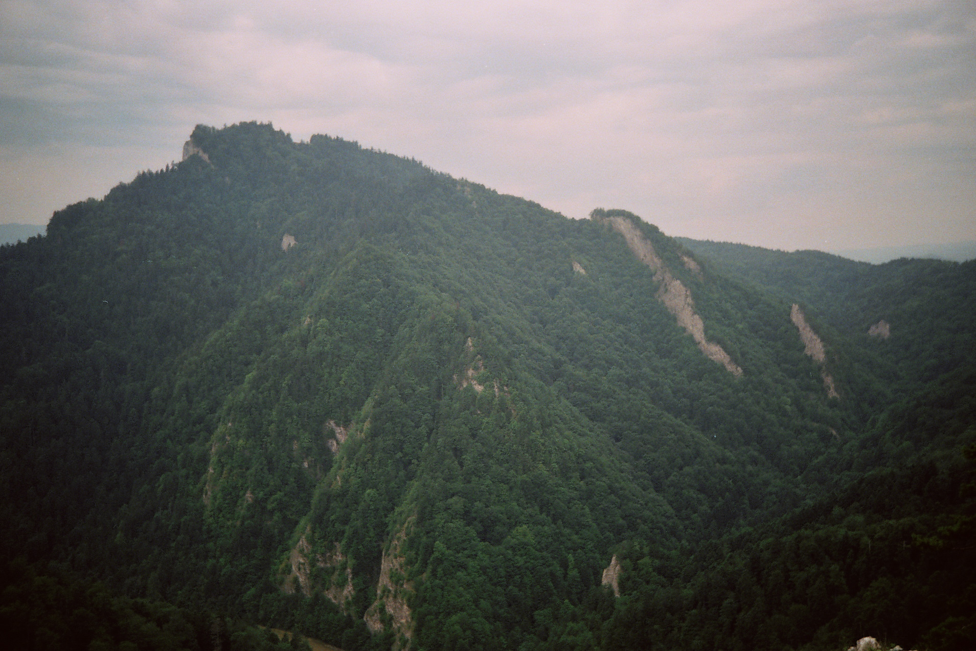 View of Trzy Korony from Sokolica